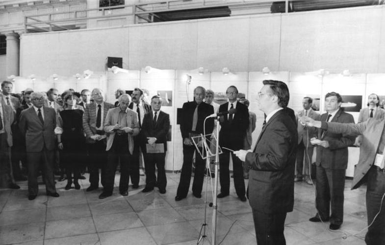 ADN-ZB Grubitzsch-2.9.85-zei Leipzig Herbstmesse 85-Staatssekretär Prof. Dr. Martin Kelm (r.), Leiter des Amtes für industrielle Formgestaltung, eröffnete im Dimitroff-Museum die zuvor bereits in Berlin gezeigte Design-Ausstellung aus der BRD. 2.v.r.: Dr. Hans Bräutigam, Leiter der Ständigen Vertretung der BRD in der DDR: 3.v.r. Philipp Rosenthal, Präsident des Rates für Formgebung (BRD), Porzellanfabrikant.